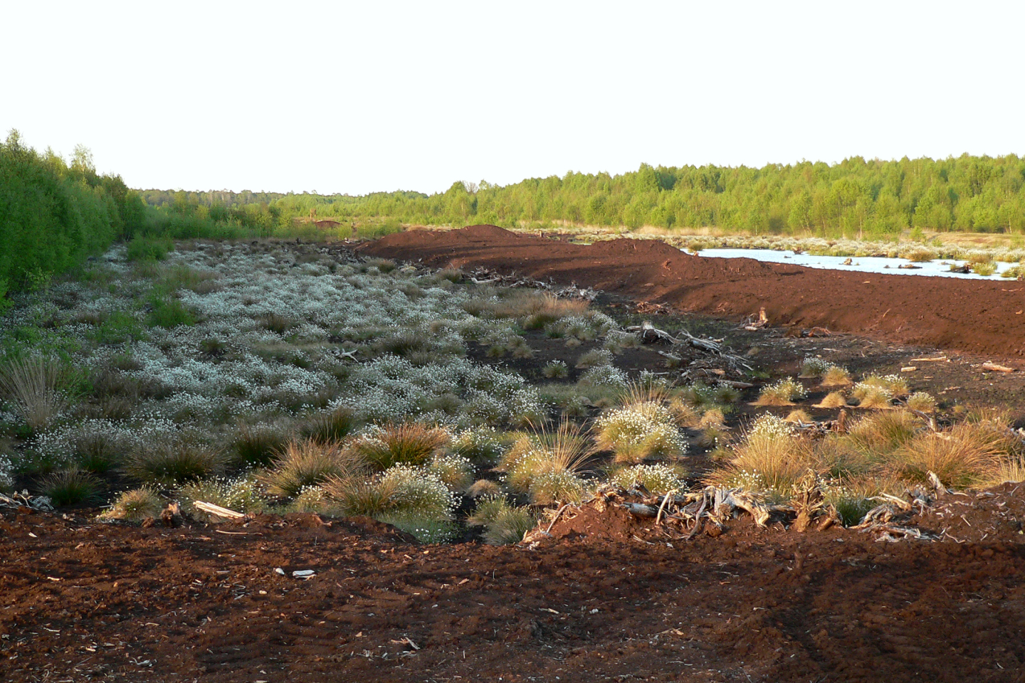 Fundgebiet und Ausgrabungsbereich der Pfahlwege im Campemoor, links neben dem Torfhügel in der Bildmitte im Bereich der kleinen Birken, im Vordergrund Wollgras